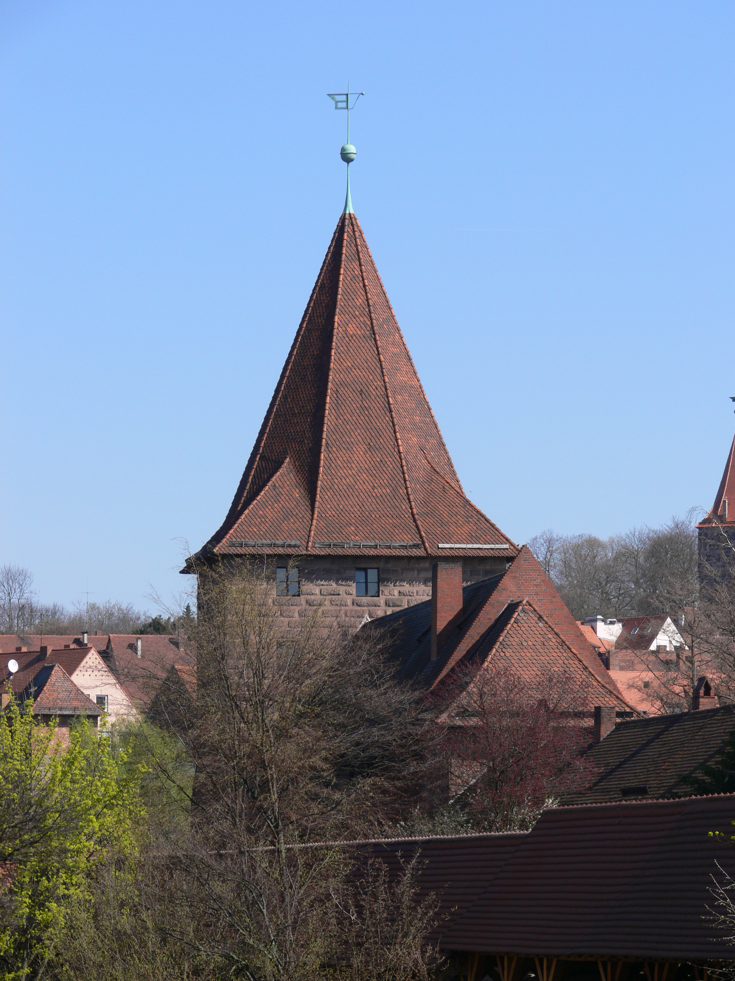 Nürnberg, Schlayerturm (Turm „Grünes F“), Westtorzwinger 2, Feldseite